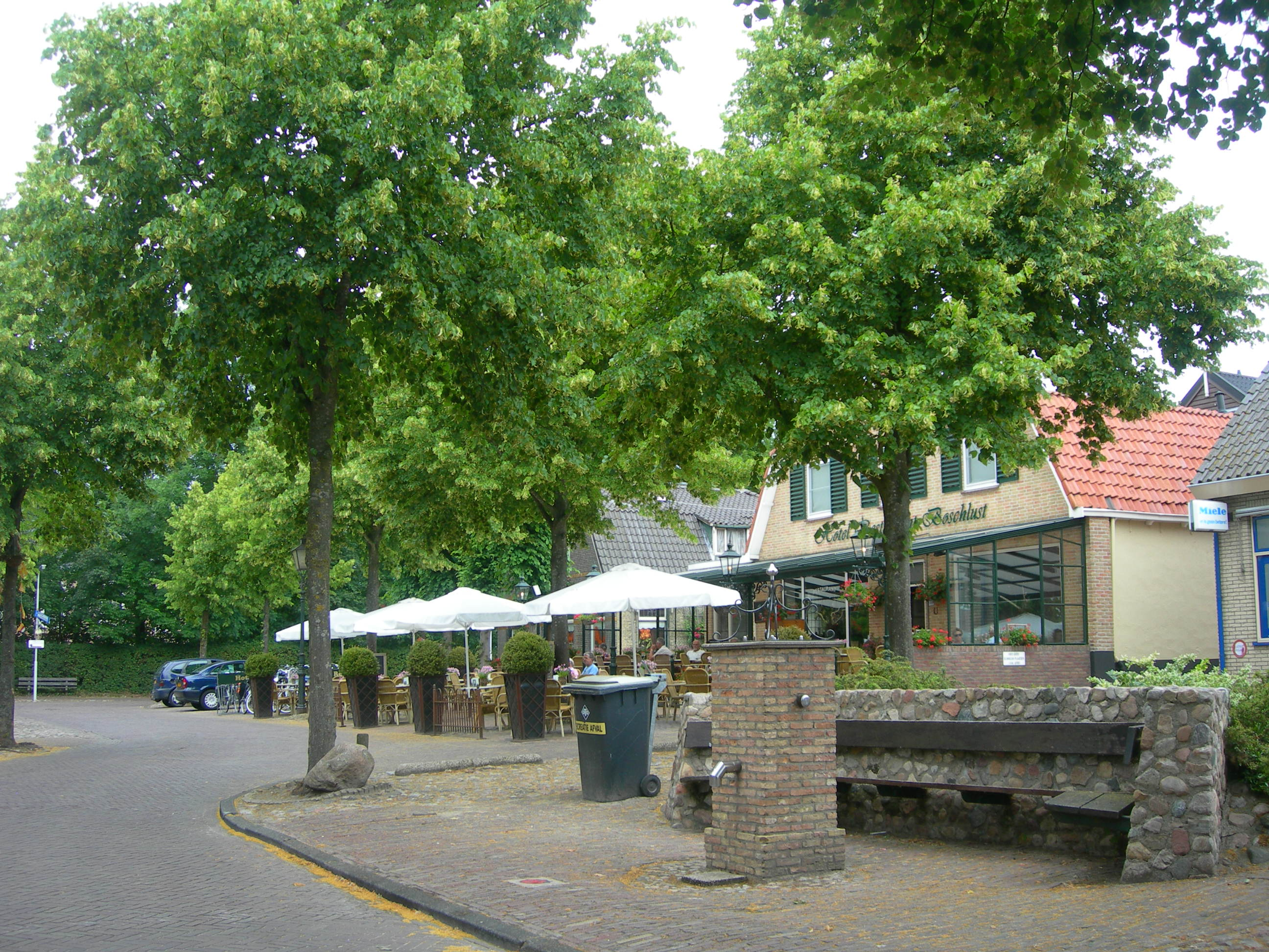 Bankje bij de Dorpspomp. Oudemirdum